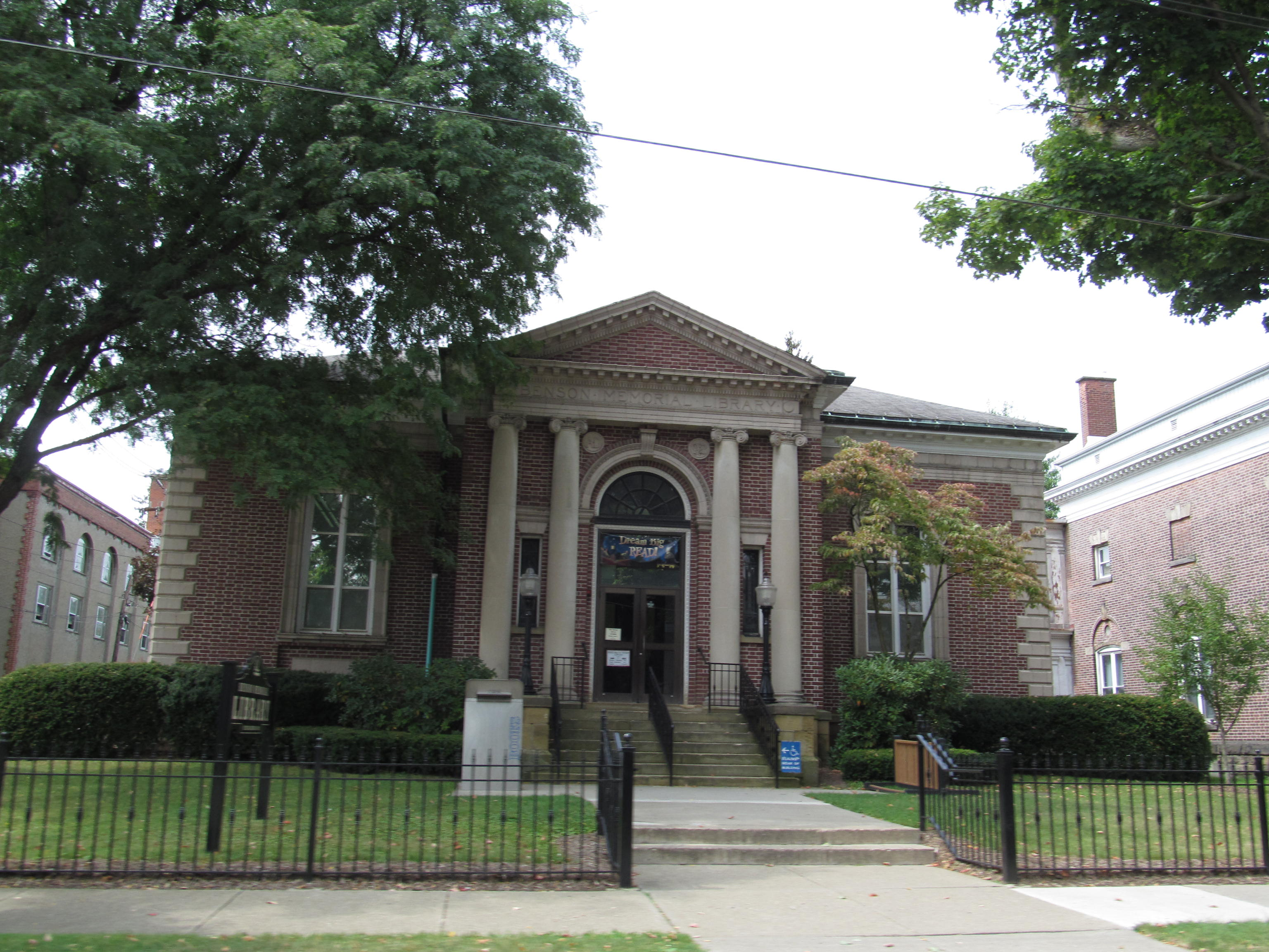 Titusville, Pennsylvania